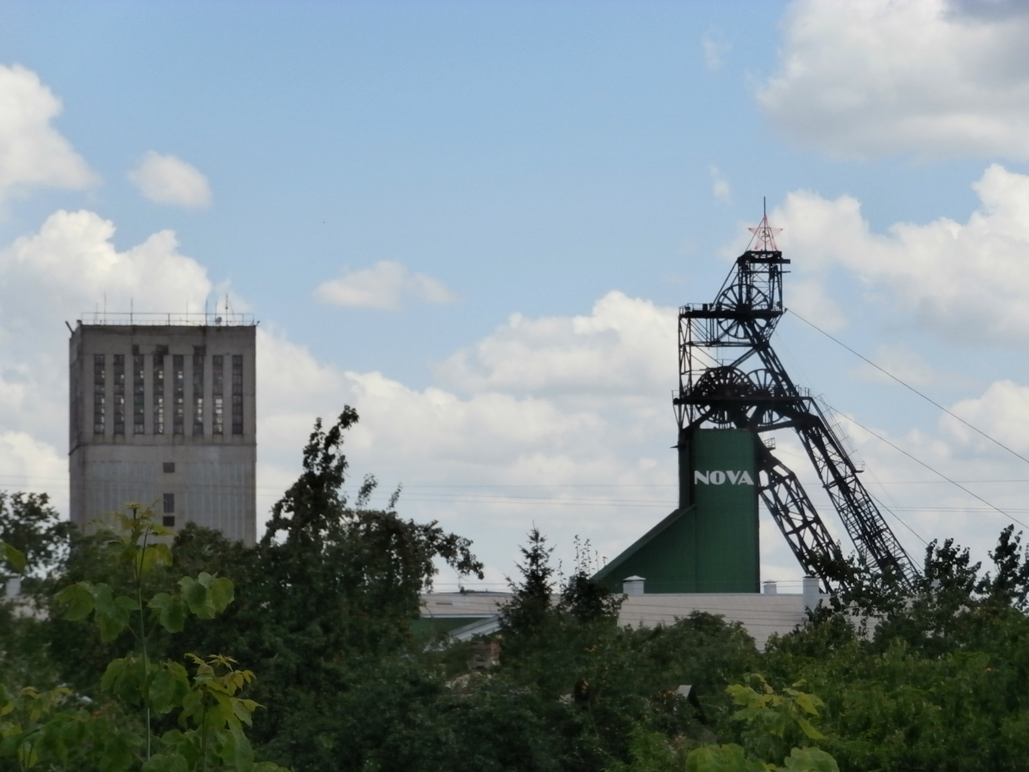 Erzmine "Nowa" Schowti Wody